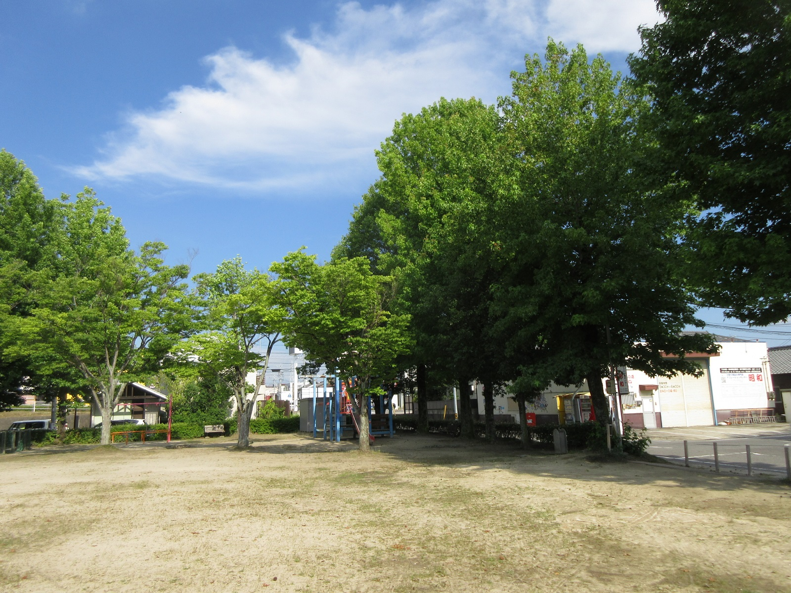 幸佐公園（岡崎市上里）